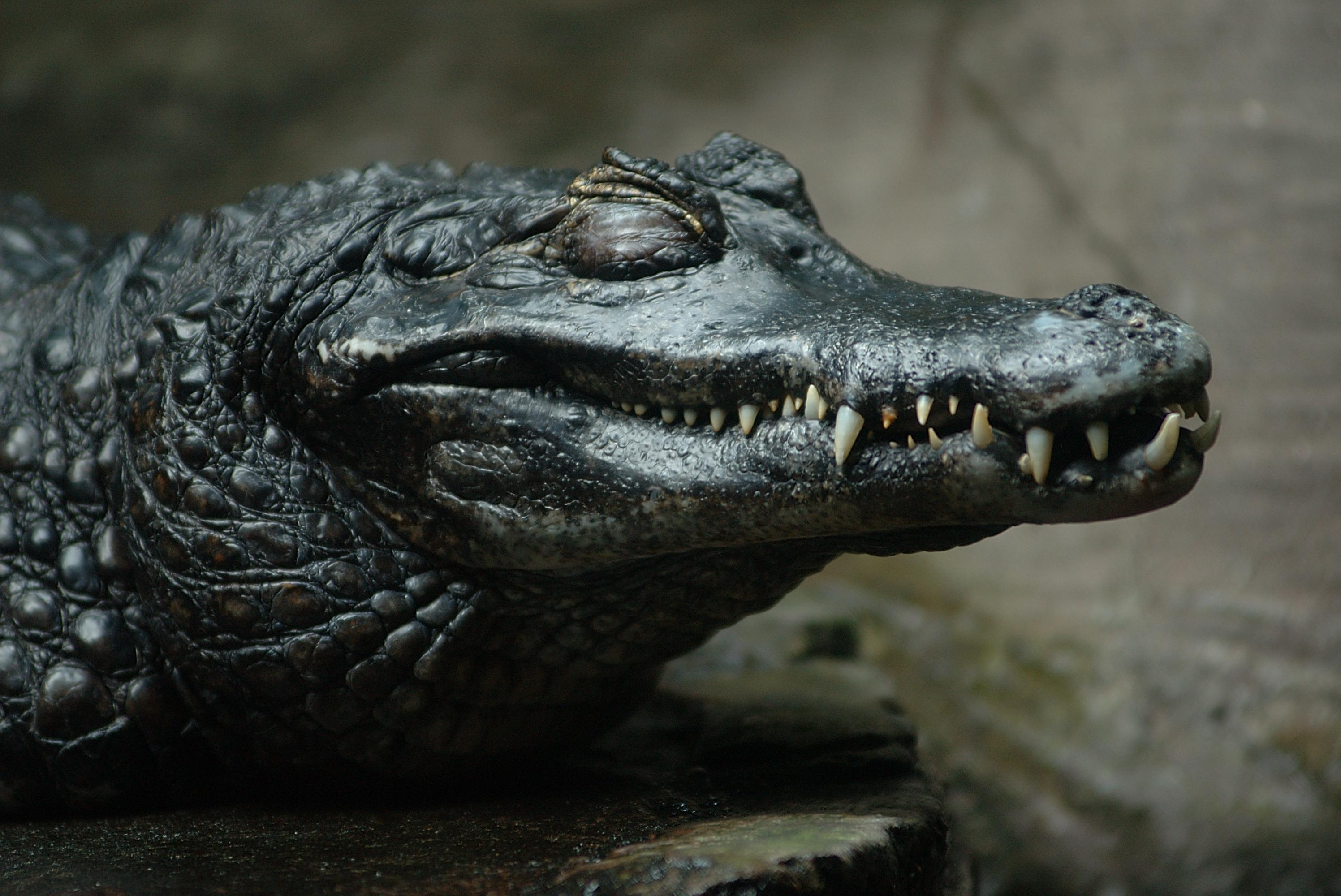 Melanistic Caiman crocodilus